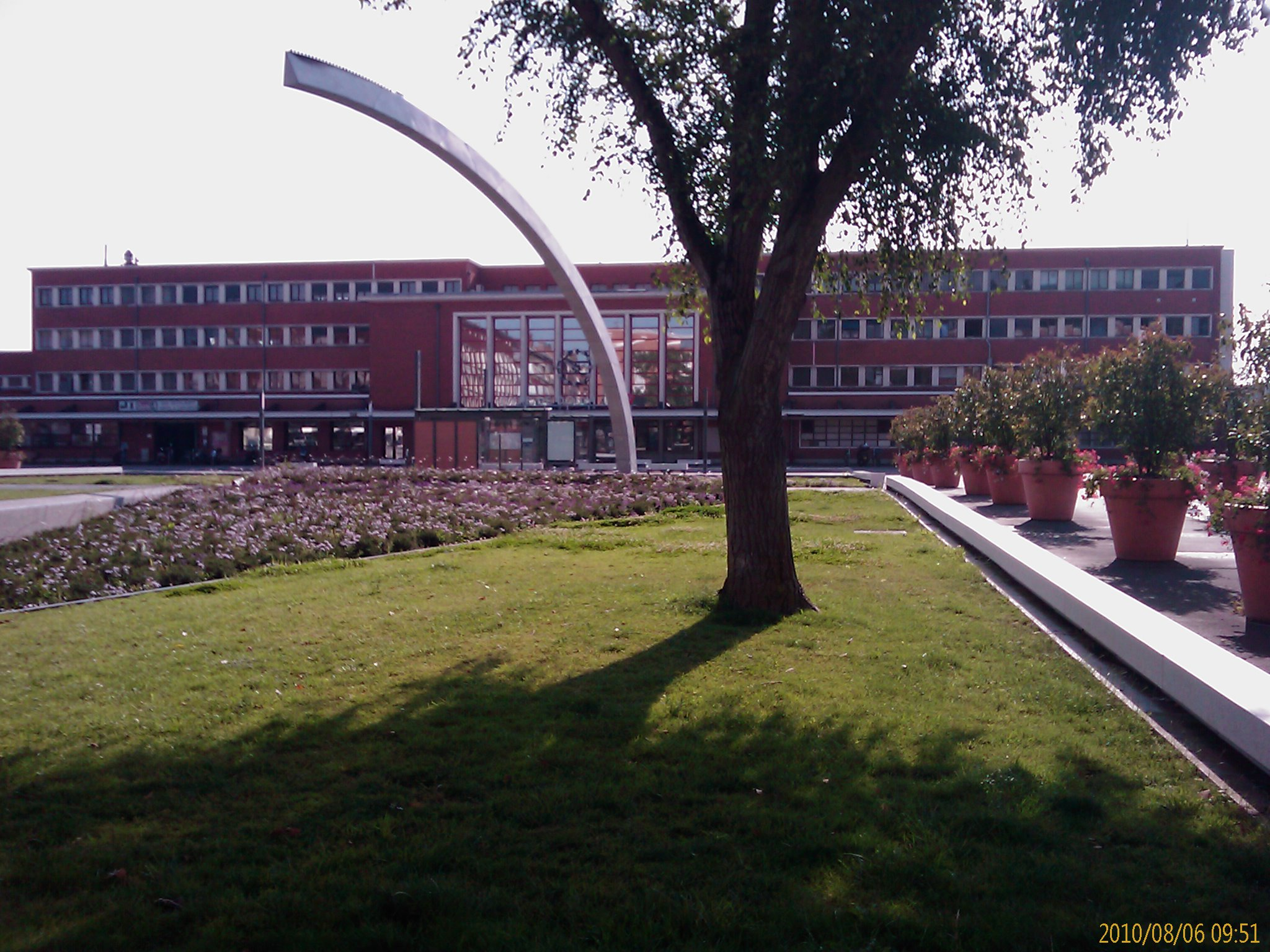 l' Arche de feu à la gare à Douai - œuvre d' André Fromelle